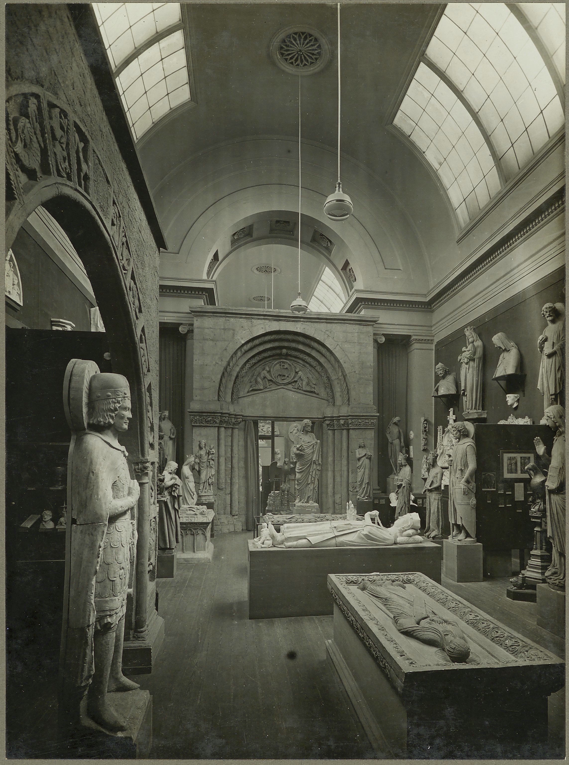 Koninklijke Academie van Beeldende Kunsten: Interieur grote zaal (opmerking: Zie ook neg 8.168)